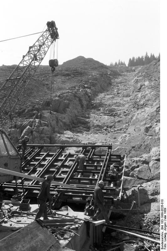 Tambach Dietharz, Talsperrenbau ADN-ZB/Ludwig 26.5.89 Bez. Erfurt: Talsperrenbau Auf der Sohle des künftigen Staudamms der Schmalwassertalsperre bei Tambach Dietharz führen Facharbeiter des VEB Spezialbaukominat Wasserbau/Talsperrenbau Weimar derzeit Verschalungs- und Montagearbeiten am Verpreßwiderlager durch. 75 Meter hoch soll sich später hier der Damm erheben und die Barriere für rund 21 Millionen Kubikmeter Wasser bilden.